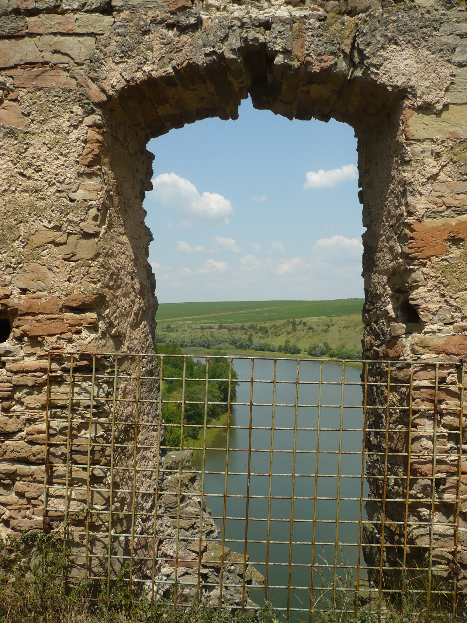 Żwańczyk z zamku w Żwańcu